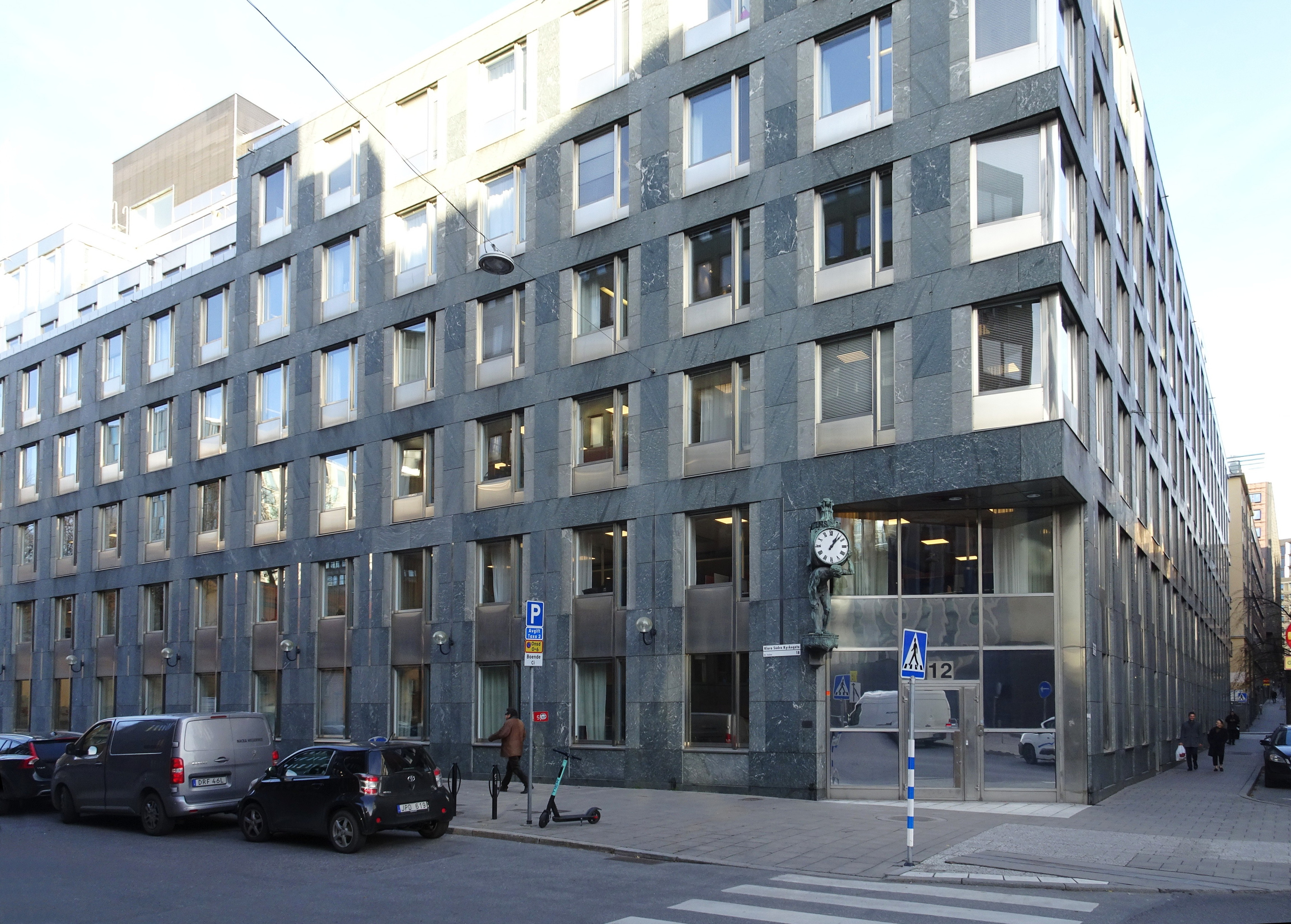 Fastigheten Svalan 9, byggår 1991–1994, arkitekt Åke Bejne, Tengbom arkitekter